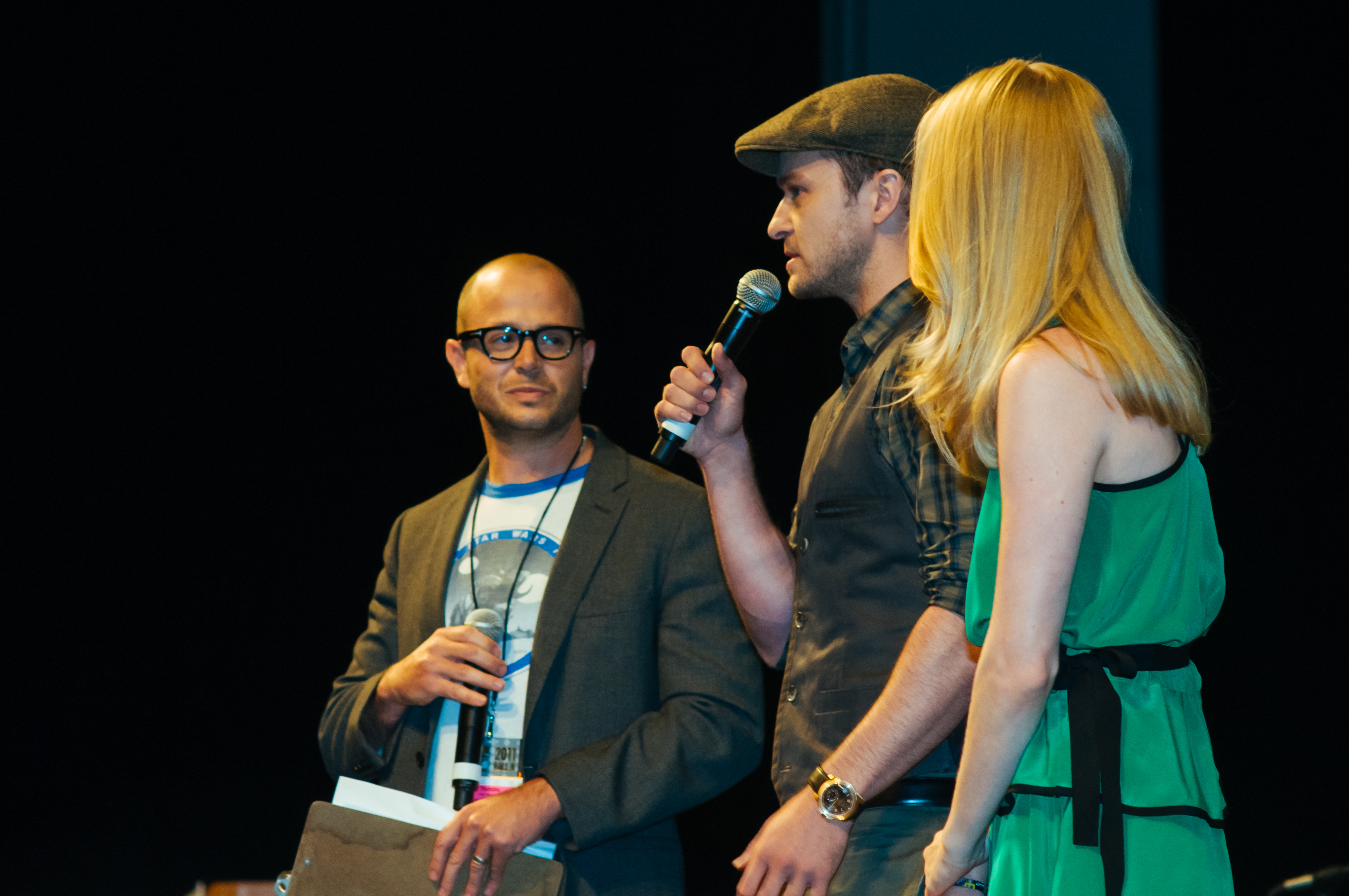 El cantante y actor Justin Timberlake y la actriz Amanda Seyfried en un evento de la Comic-Con 2011 para promocionar su película In Time.